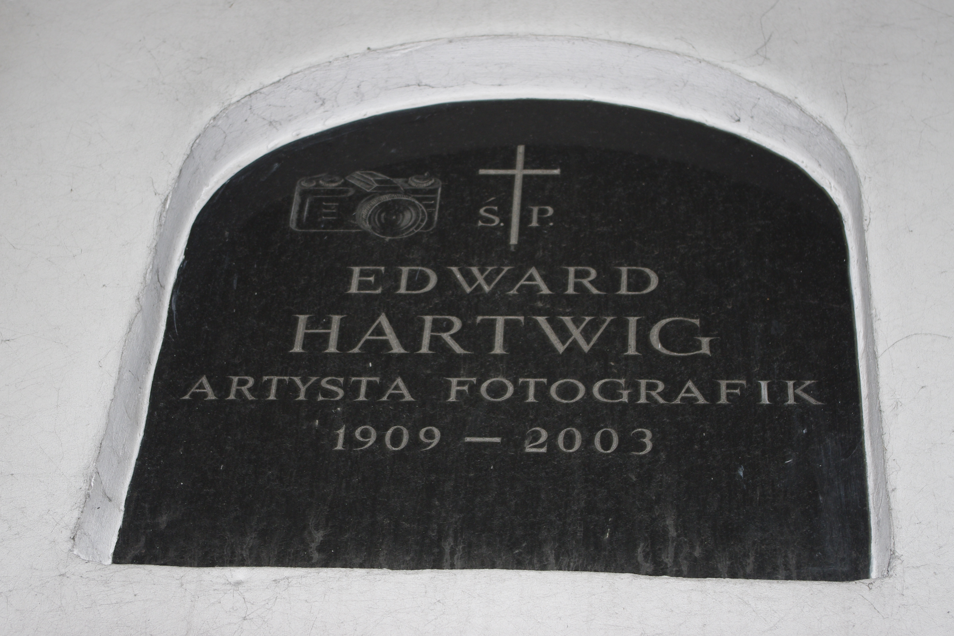 Grób fotografika Edwarda Hartwiga w Katakumbach na Starych Powązkach w Warszawie